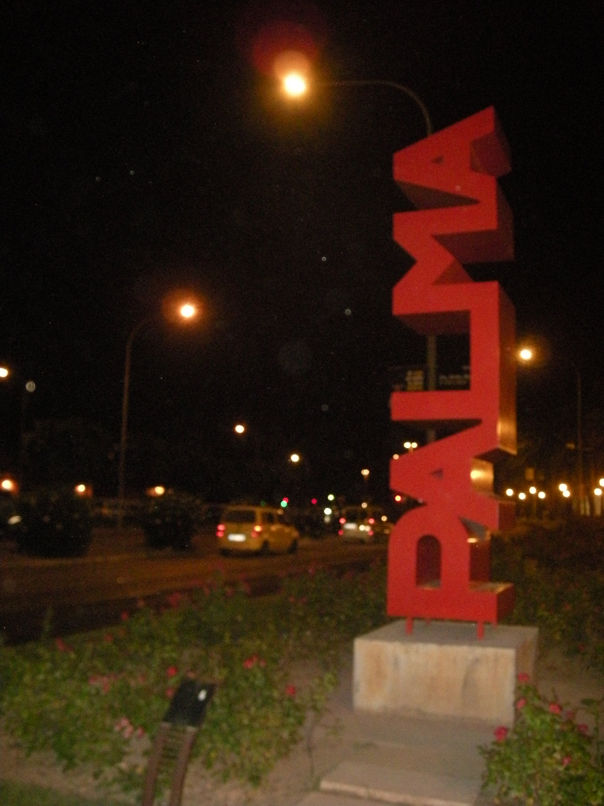 Escultura "Palma" (1999) al Passeig Marítim de Palma